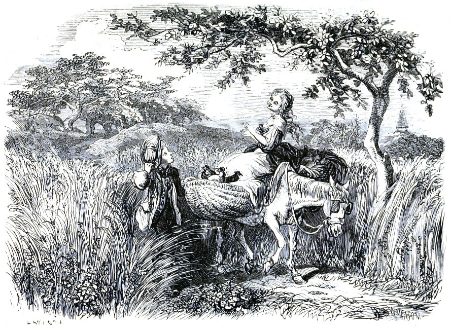 Illustration d'Héliodore Pisan pour l'édition de 1880 de Ange Pitou, roman d'Alexandre Dumas père.